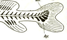 Hypuralia in a Teleostei-Tail